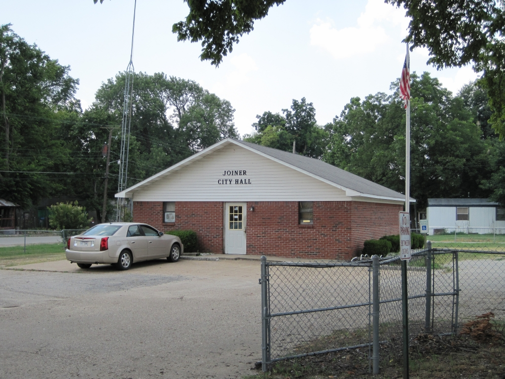 Joiner, Arkansas.